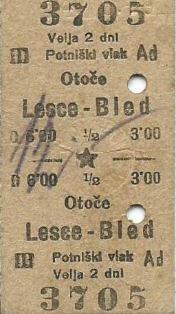 Železniška vozovnica Otoče - Lesce-Bled